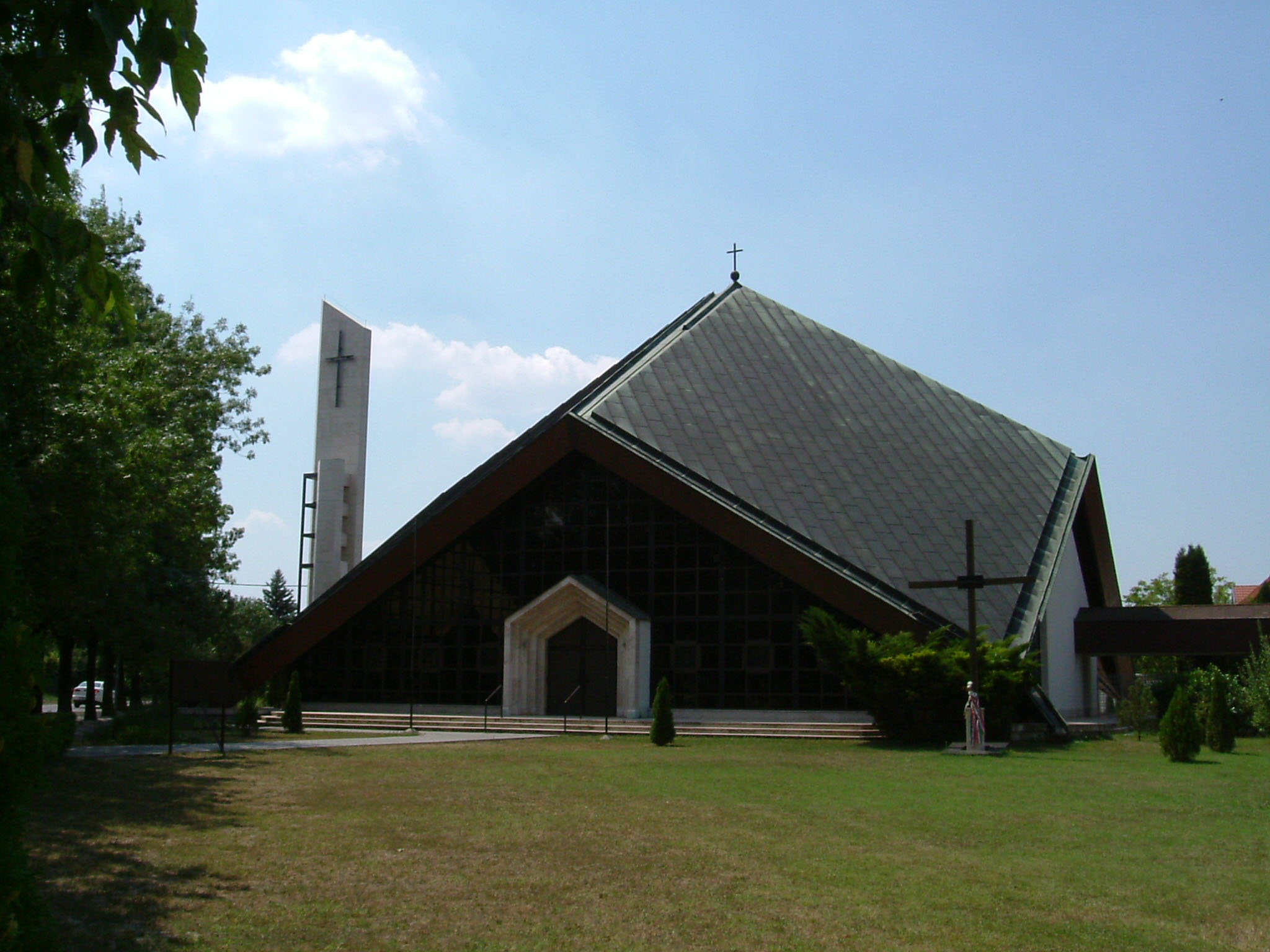 Boldog Özséb plébániatemplom, Békásmegyer, Budapest III. kerület